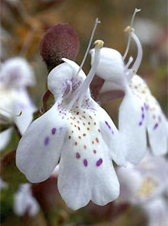 Prostanthera prostantheroides (= Wrixonia prostantheroides) - Flores.